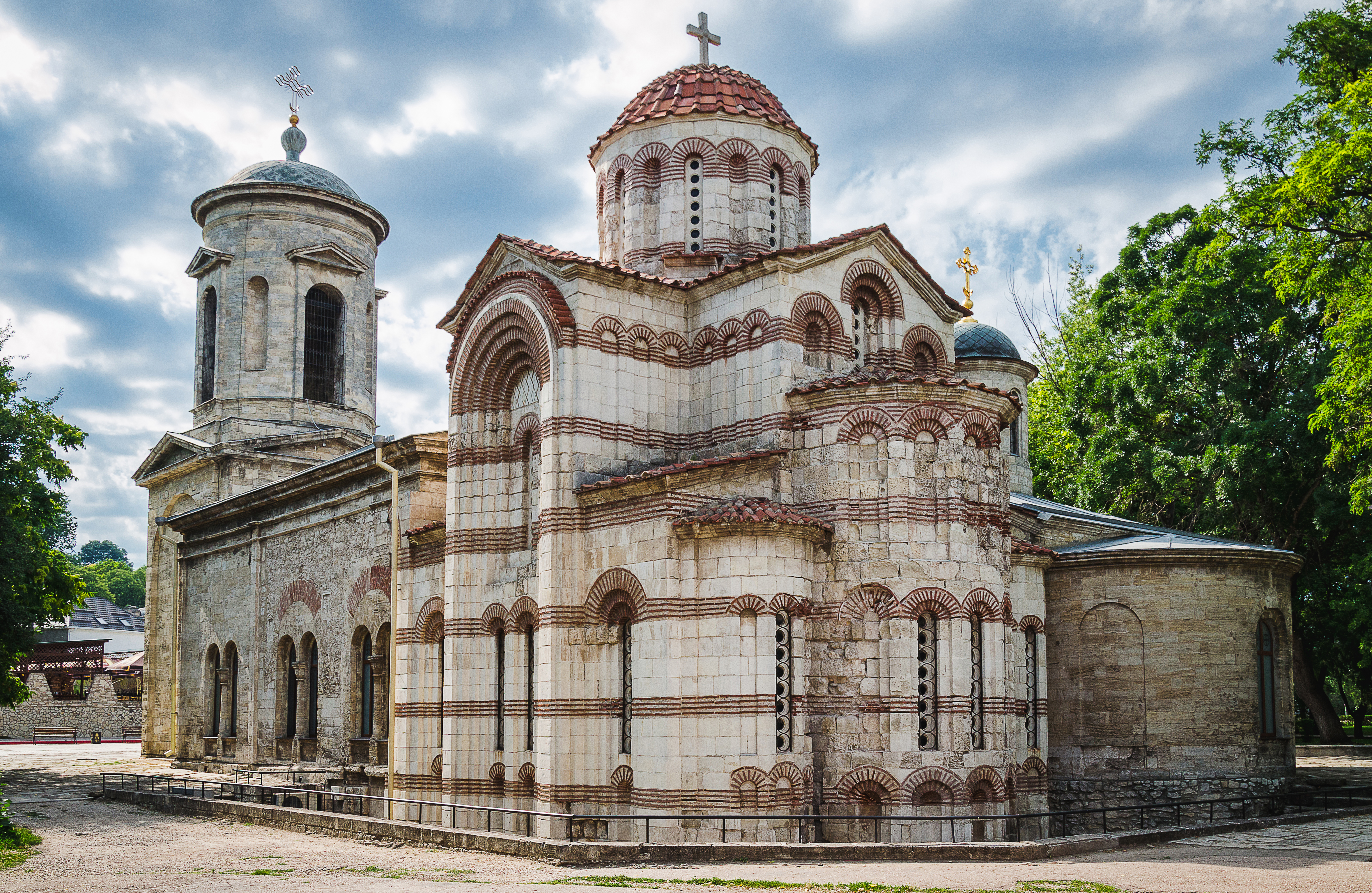 Церковь Иоанна Предтечи, VIII-Х вв.: улица Димитрова, 3, литер "А", Керчь, Крым This object is located on the Crimean Peninsula and recognized as cultural heritage by both Russia and Ukraine under the monument ID: 8230424000/ 01-112-0017, respectively. The legal status of the Crimean region is currently disputed.